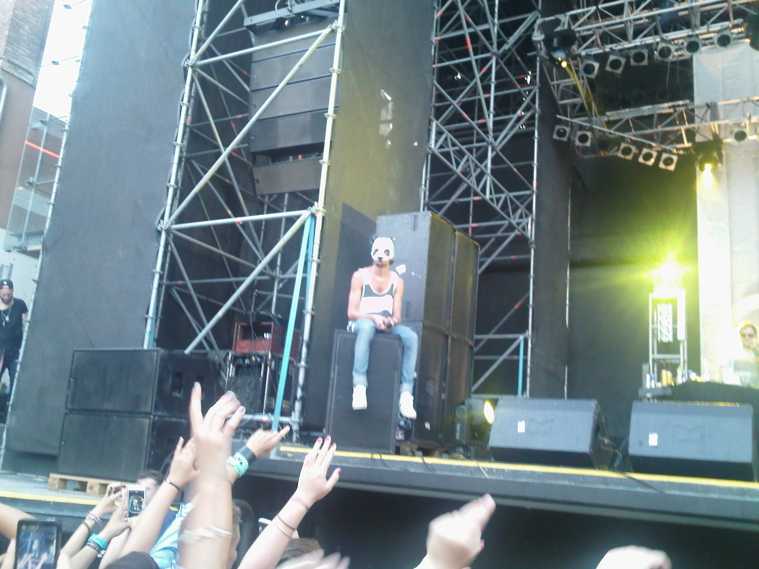 Rapper Cro in Wien (2012)